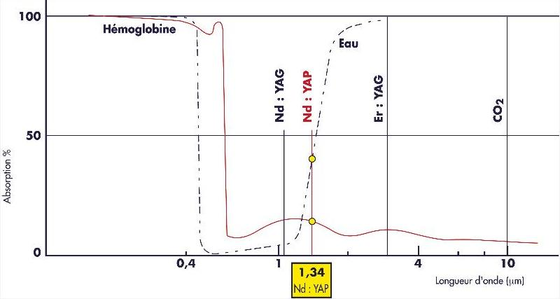 absoption du yap et du yag dans l'eau et l'hémoglobine